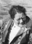 Margarete Wittkowski (Bildausschnitt)